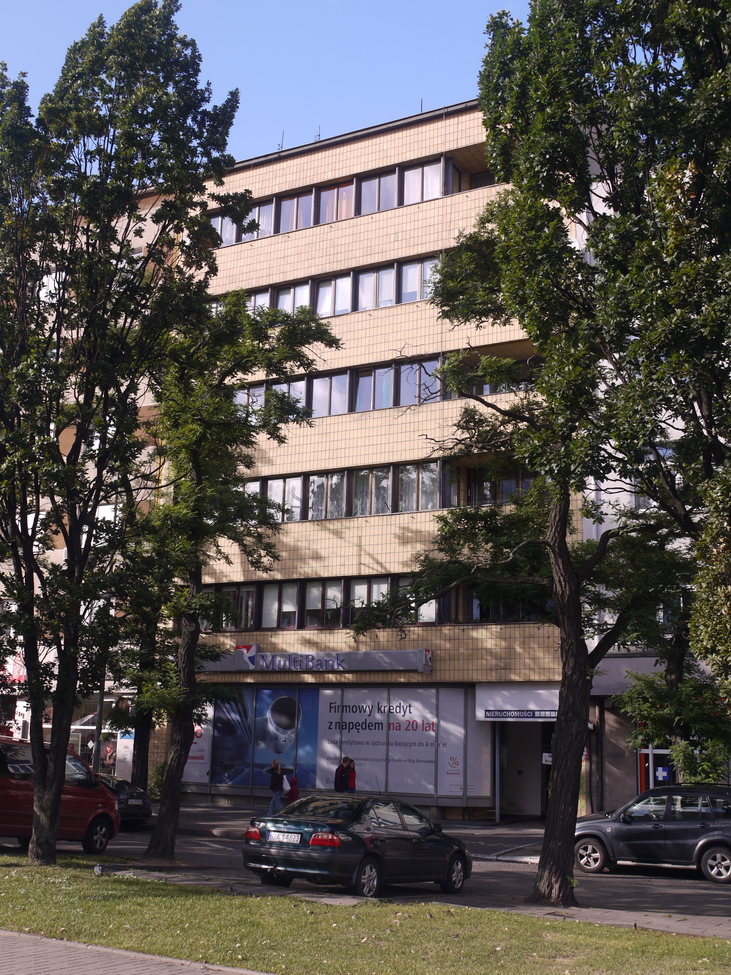 Gdynia Śródmieście, Skwer Kościuszki 16 - Kamienica Adama Jurkowskiego